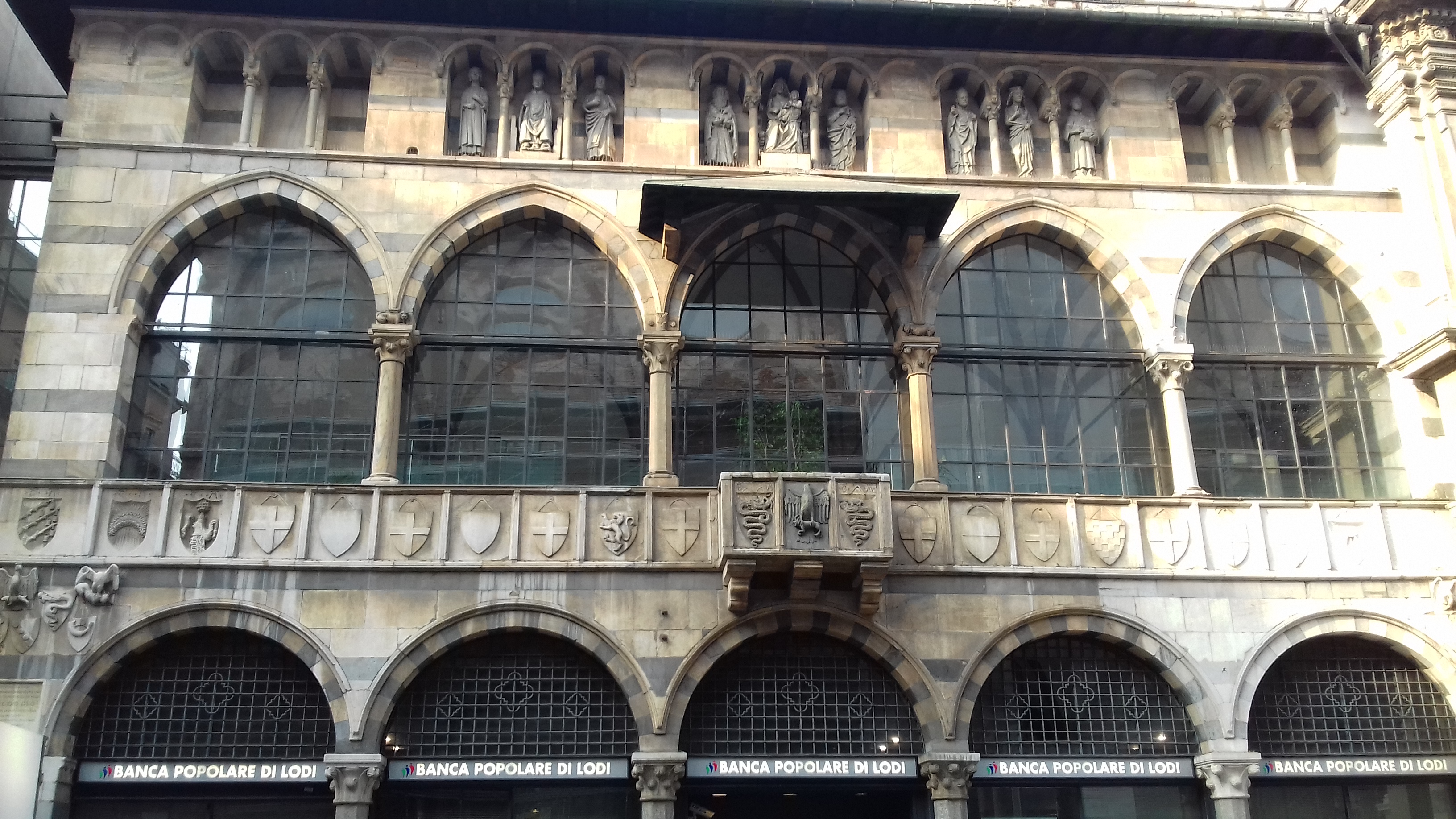 Facciata